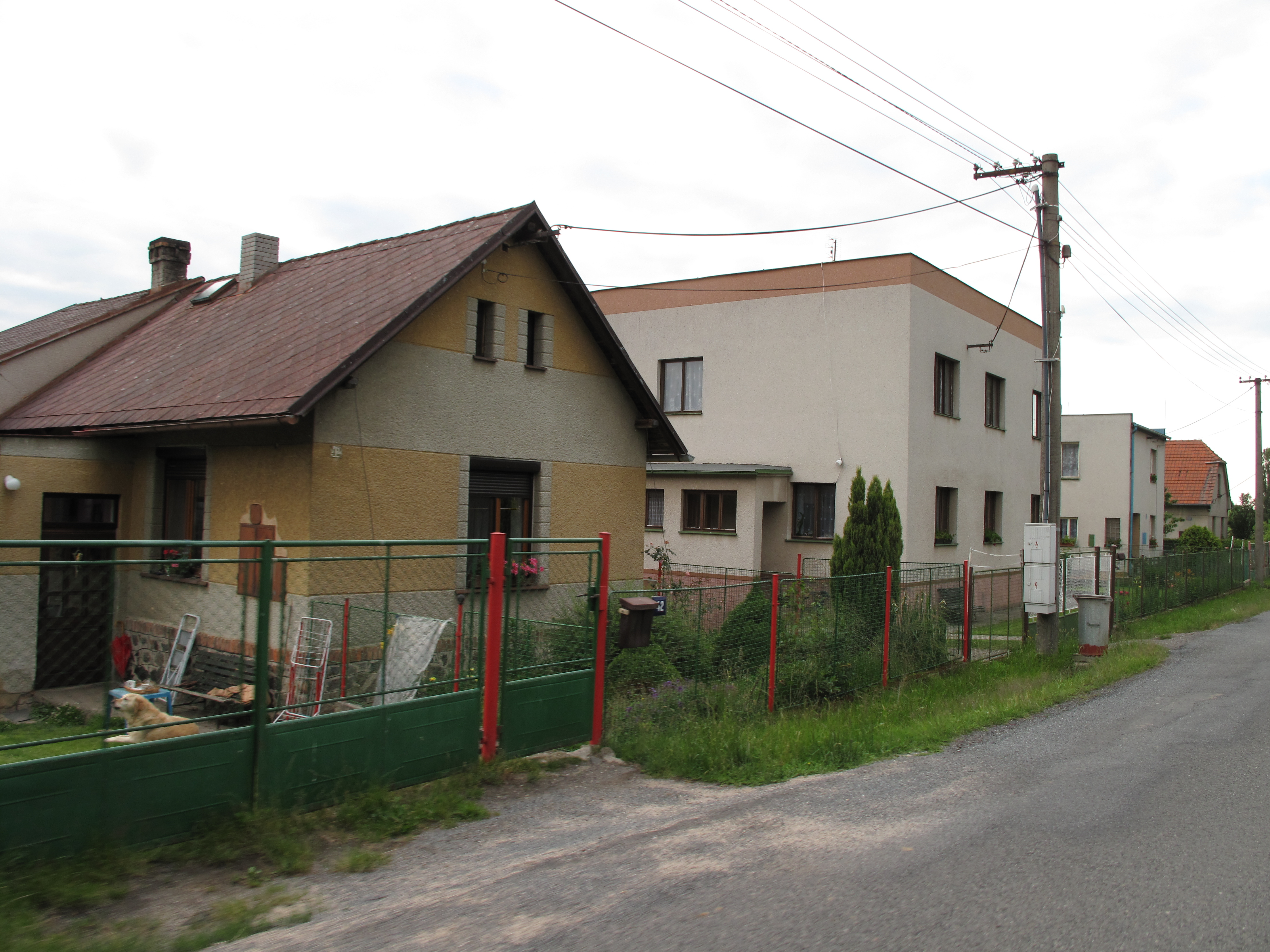 Domy v Drážkách. Okres Rokycany, Česká republika.